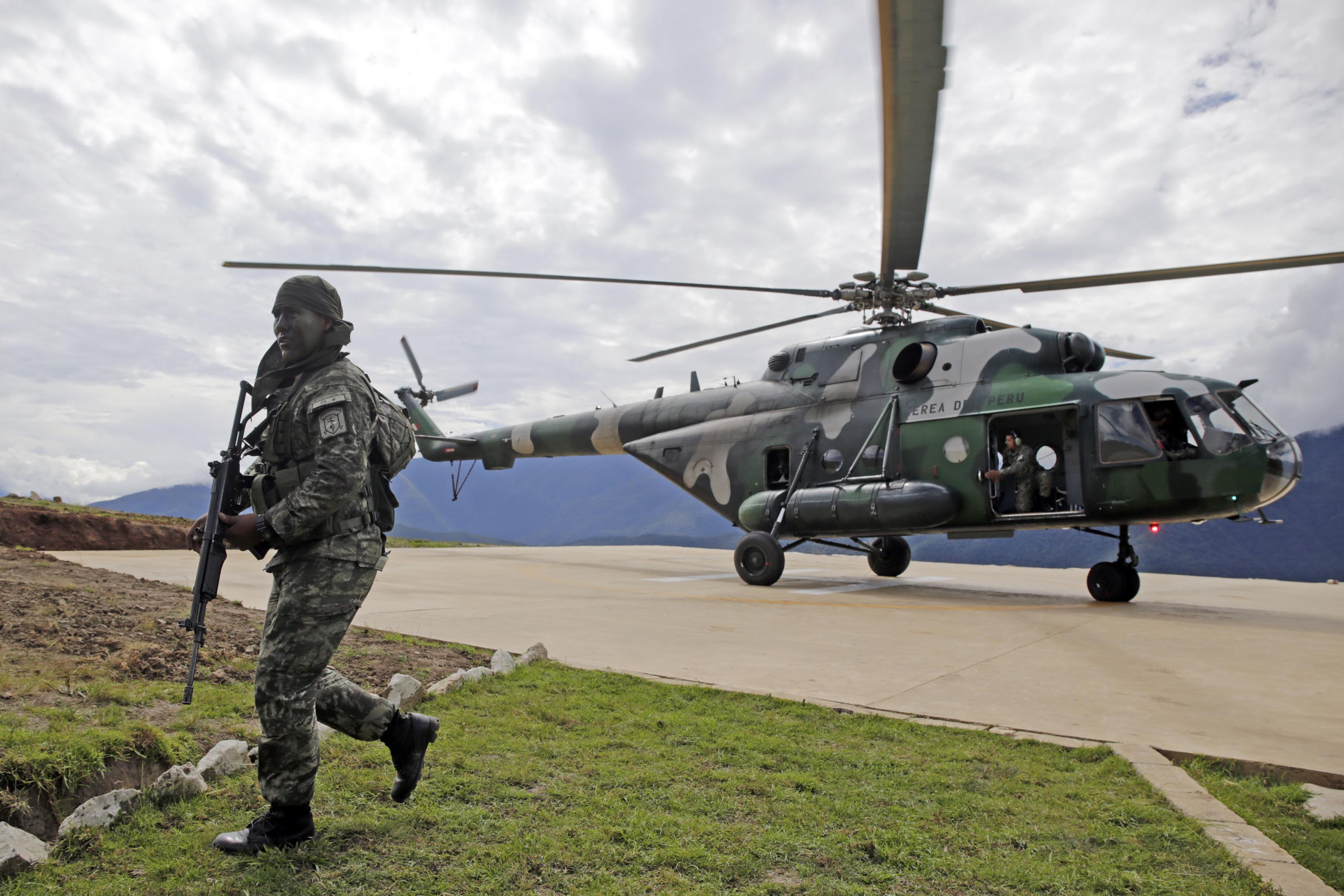 El ministro de Defensa, Pedro Cateriano Bellido, cumplió una visita de inspección a las bases contraterroristas ubicadas en el Valle de los Ríos Apurímac, Ene y Mantaro (VRAEM) donde comprobó las condiciones óptimas en que se desempeñan nuestros soldados. Acompañado del comandante general del Ejército, General Ronald Hurtado Jiménez, el titular del sector arribó a las bases de Mazamari, Pichari e Incahuasi, en las regiones Junín y Cusco. En Incahuasi, el ministro verificó las nuevas instalaciones y el correcto desempeño del personal asignado en esta base militar, desde donde se logrará control territorial en la zona. También se supervisaron las operaciones militares que se realizan en Mazángaro y Unión Mantaro, puntos claves en el VRAEM y rutas de tránsito del narcotráfico. El ministro Cateriano anunció que el gobierno reforzará la estrategia contraterrorista con importantes adquisiciones. “A fines de este año llegarán ocho nuevos helicópteros para servir en esta zona. Se trata de una geografía agreste donde el principal vehículo de transporte es el helicóptero, y las Fuerzas Armadas lo requieren”, mencionó. Finalmente, adelantó que el gobierno construirá cuatro nuevas bases contraterroristas y la Fuerza Aérea adquirirá seis radares, destinados a reforzar la lucha contra el terrorismo, narcotráfico y otras amenazas.